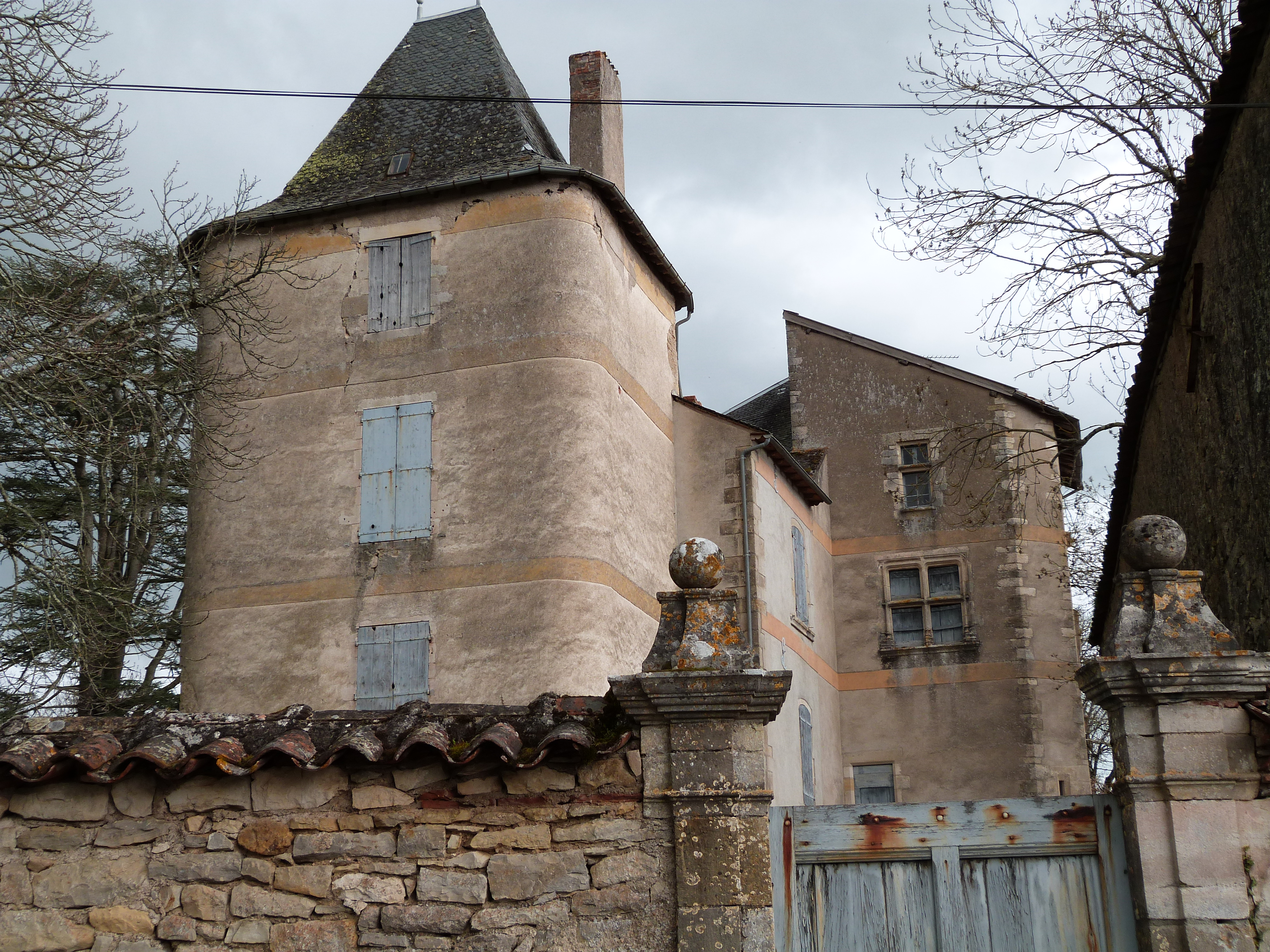 Château de Toulonjac (InscritClassé) .